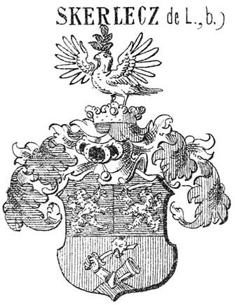 A lomniczai Skerlecz család bárói cimere Siebmacher könyvéből